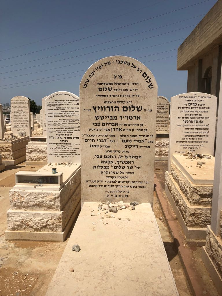 מציבת האדמו"ר רבי שלום מבייטש